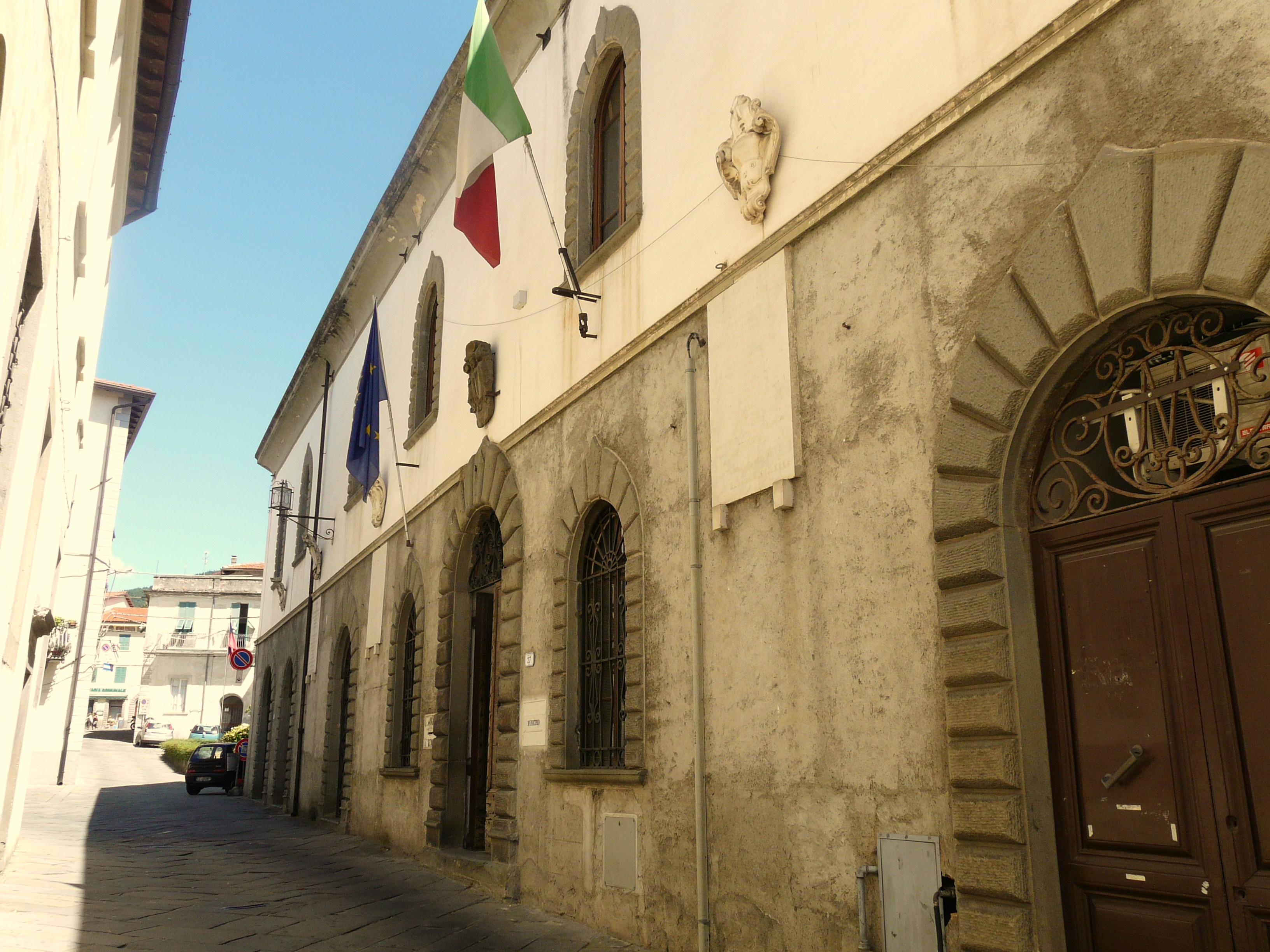 Municipio, Fivizzano, Toscana, Italia